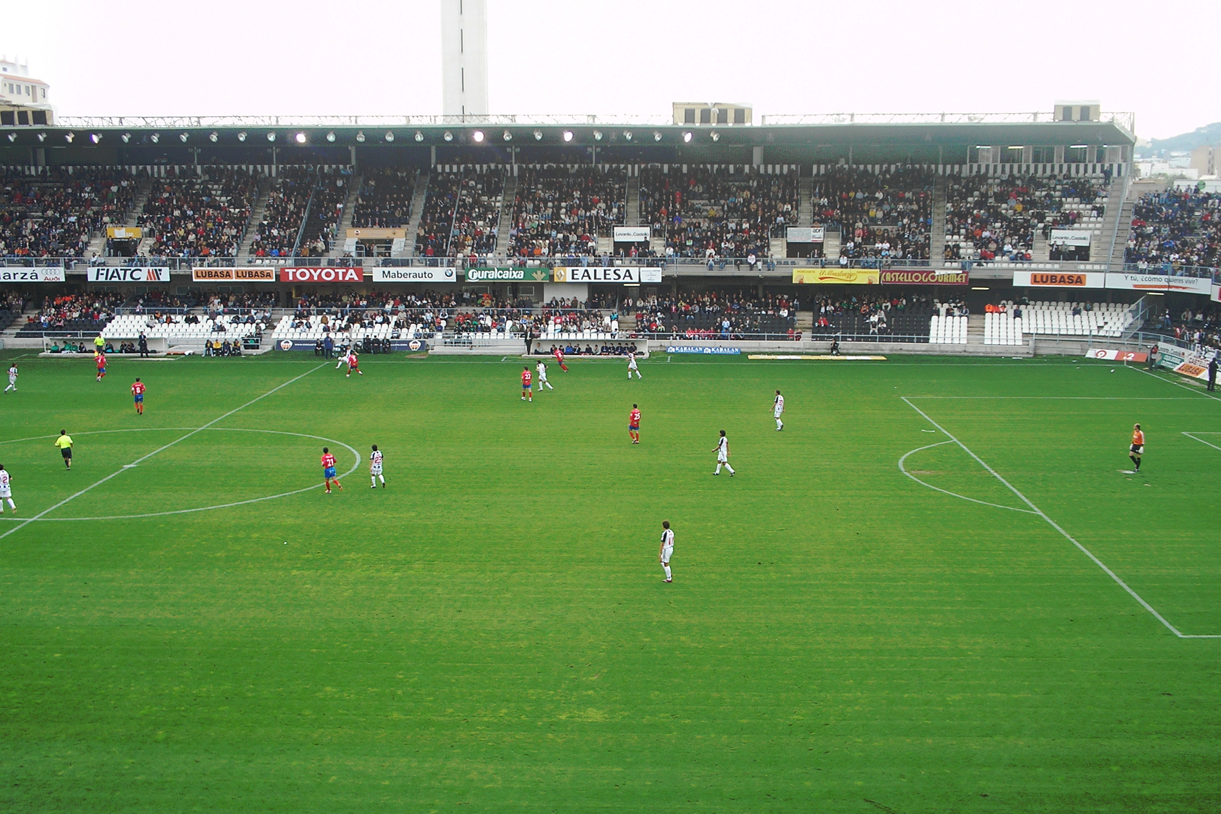 Imatge del CD Casellón - CD Numancia corresponent a la jornada 32 de la Lliga BBVA 2006/07.